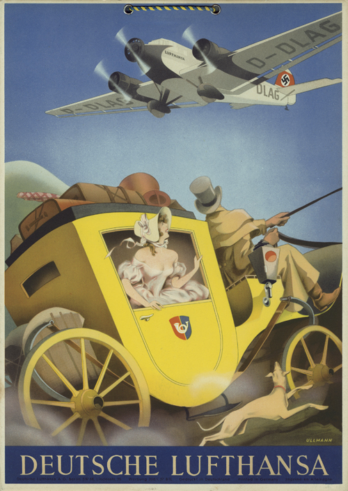 1936 entstandenes Vielfarb-Plakat (Druckvermerk Werbung 20d/I. 37 BTL) für die Deutsche Lufthansa nach einem Entwurf von Max Ullmann. Ein dreimotoriges Flugzeug Typ Junkers Ju 52, Spitzname: „Tante Ju“, hier zur Zeit des Nationalsozialismis mit Hakenkreuz, fliegt über einer altmodischen Postkutsche in voller Fahrt, aus der sich eine "offenherzige" Dame bewundernd herausbeugt, den Blick erfreut nach oben gerichtet ...